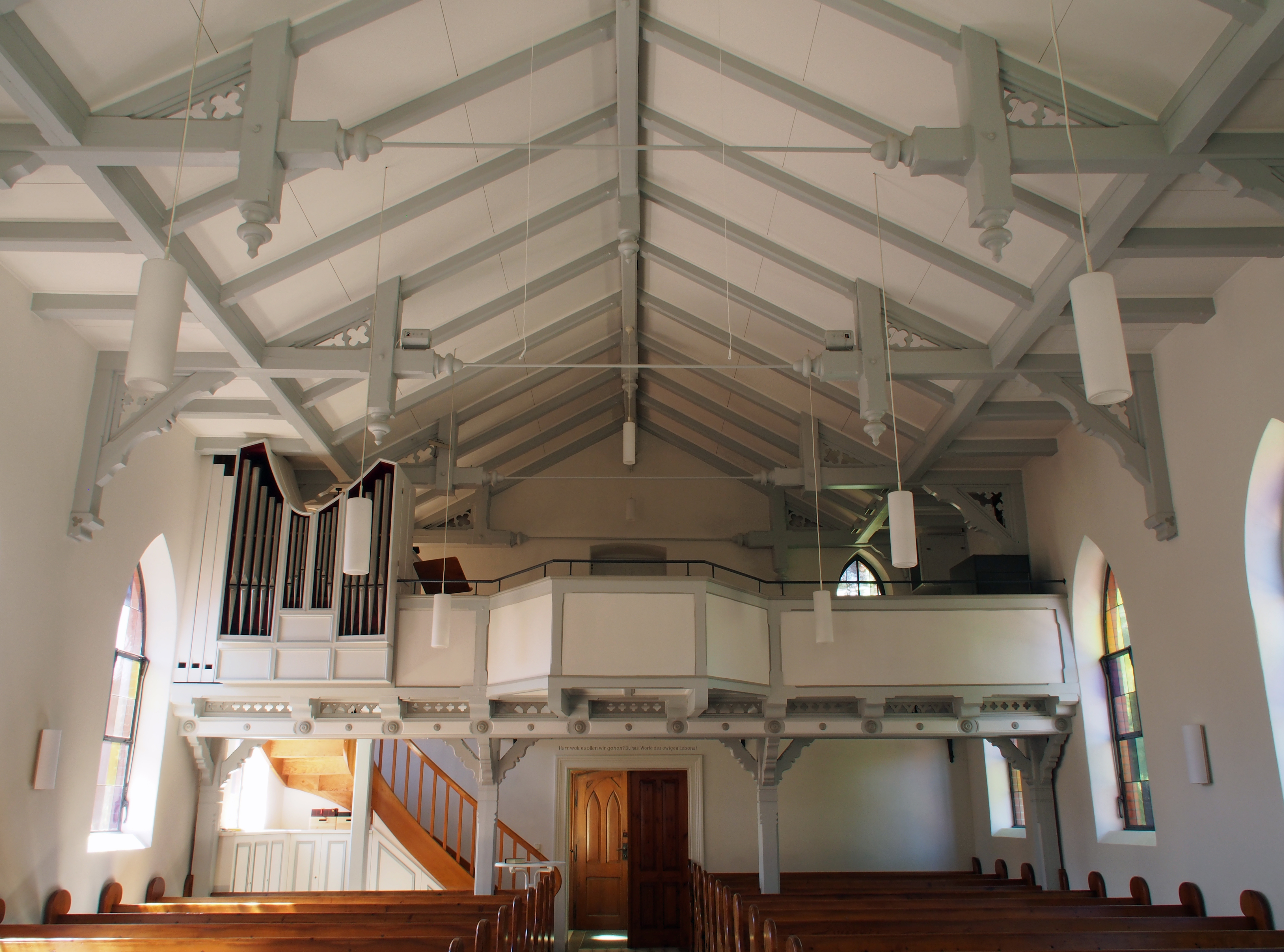 Innenraum mit Orgel der Kleinen Kreuzkirche in Hermannsburg, Niedersachsen, Germany